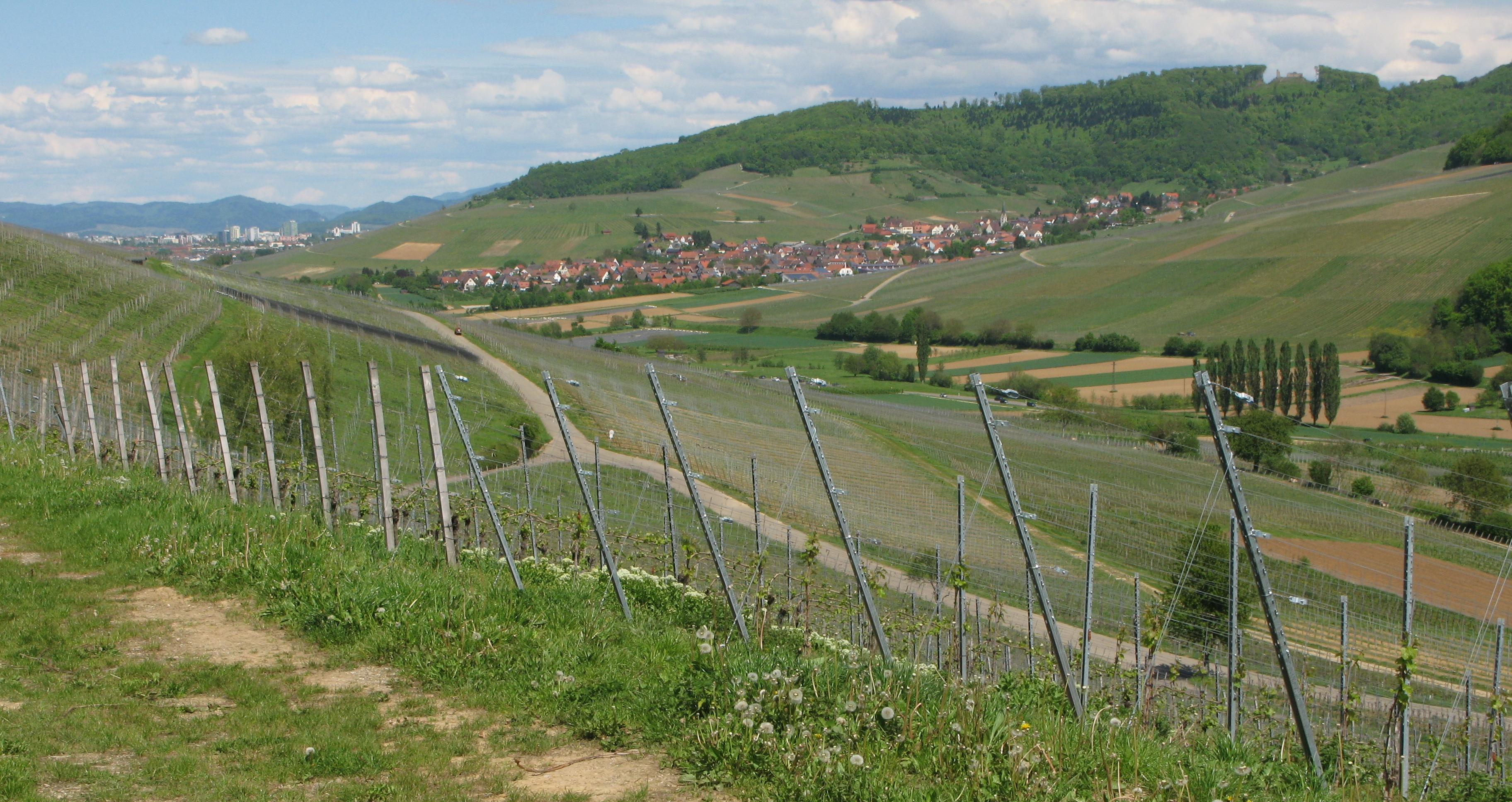 Ebringen am Fernwanderweg Markgräfler Wiiwegli im Markgräflerland.